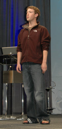 Mark Zuckerberg, May 2007